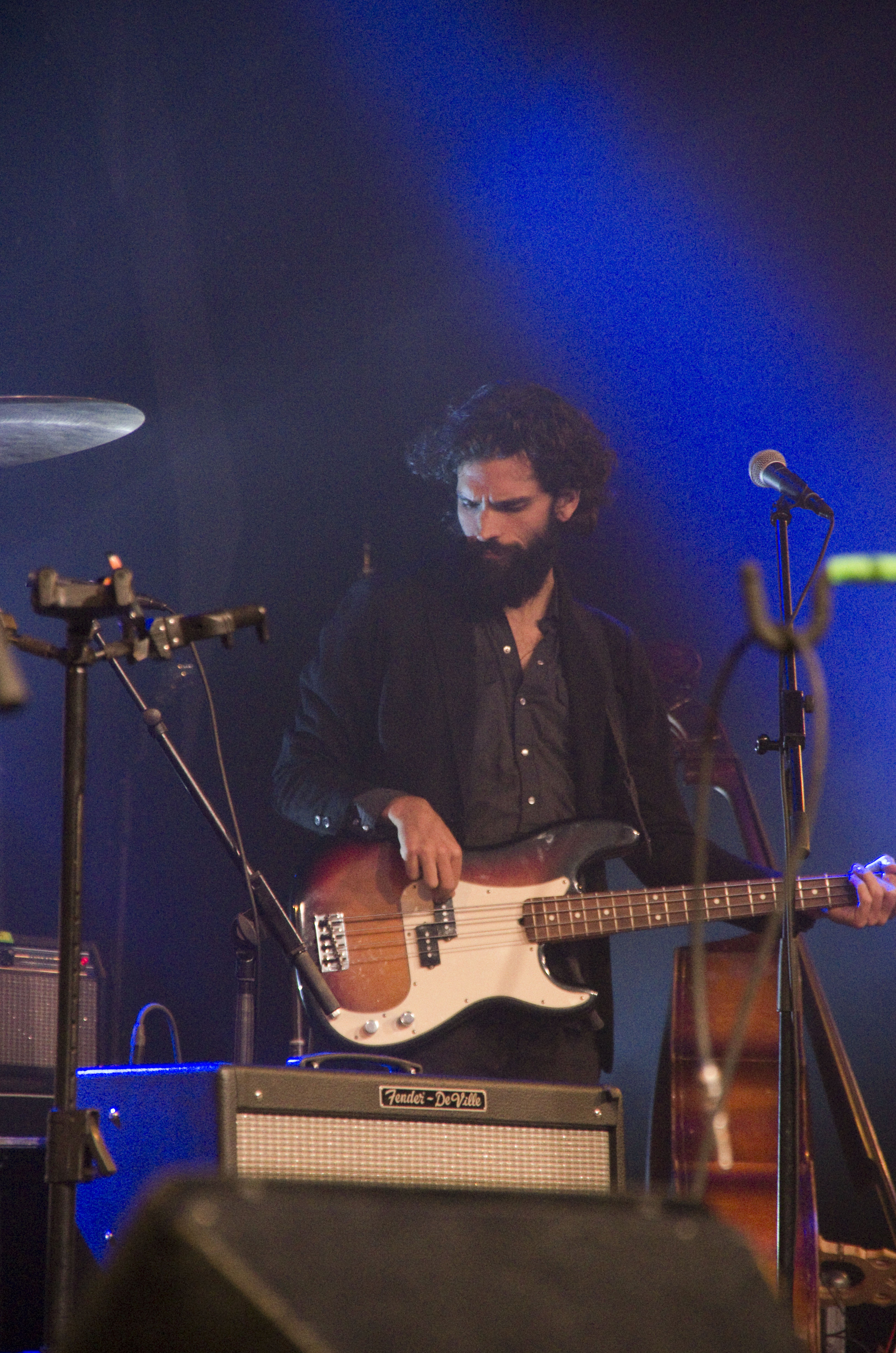 Das Zelt-Musik-Festival 2016 in Freiburg im Breisgau 13.07.2016 Calexico